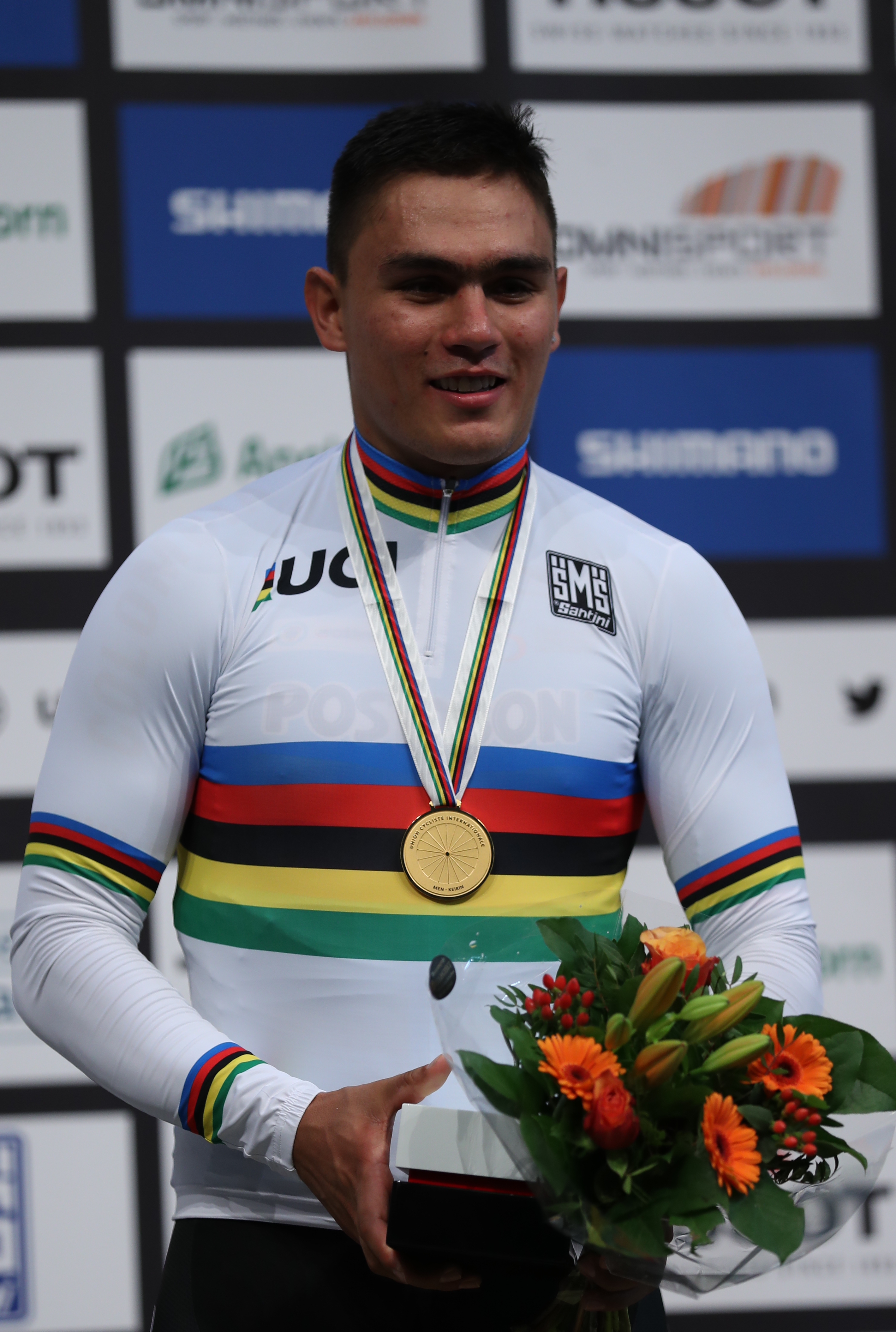 Fabián Puerta aus Kolumbien - Weltmeister im Keirin